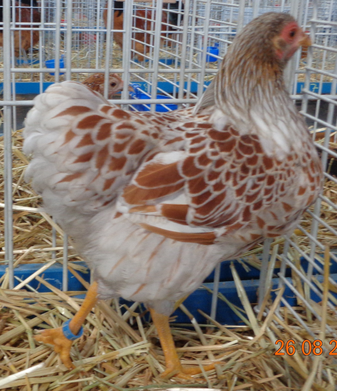 Poule Wyandotte doré liseré naine